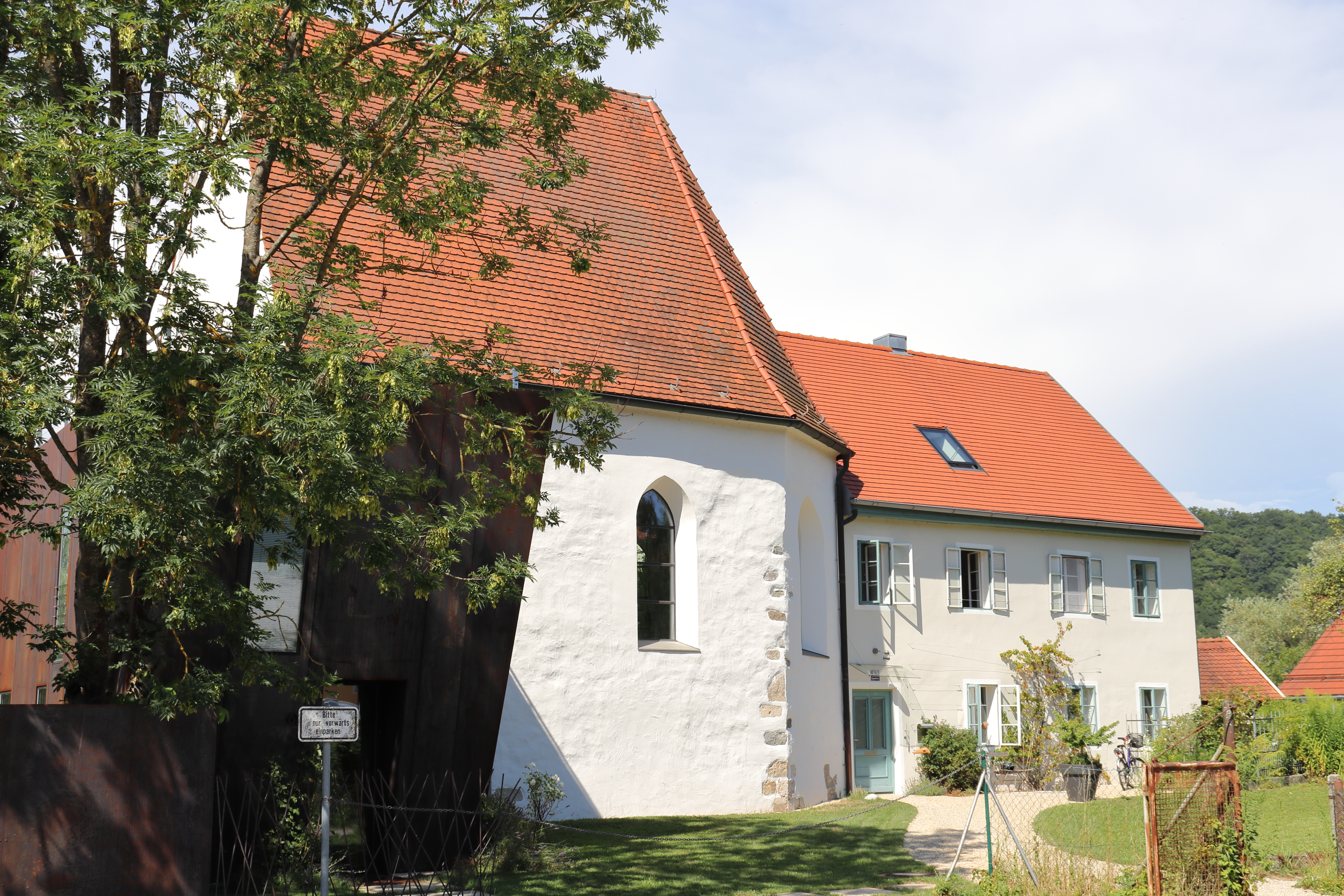 Ehemalige Kirche St. Ägidius, Kapuzinerstraße 61, Passau This is a photograph of an architectural monument.